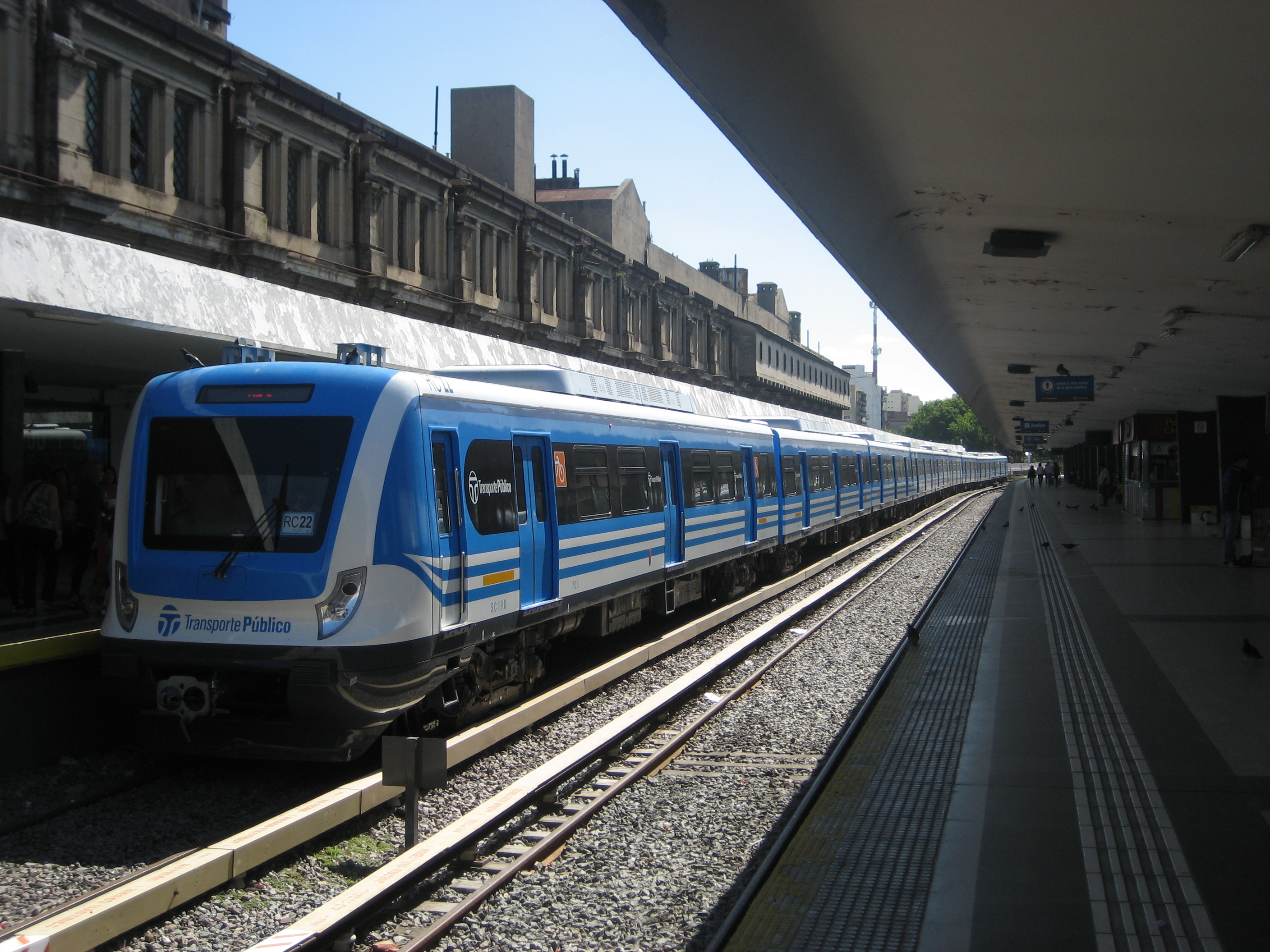 nuevo tren en andén 1 de la Estación Once de Septiembre (Línea Sarmiento)